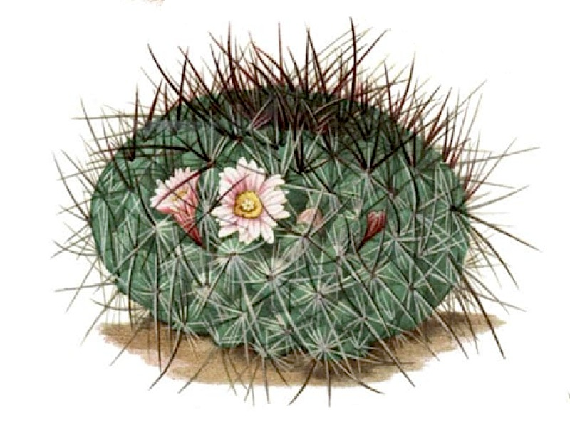 Mammillaria discolor subsp. discolor